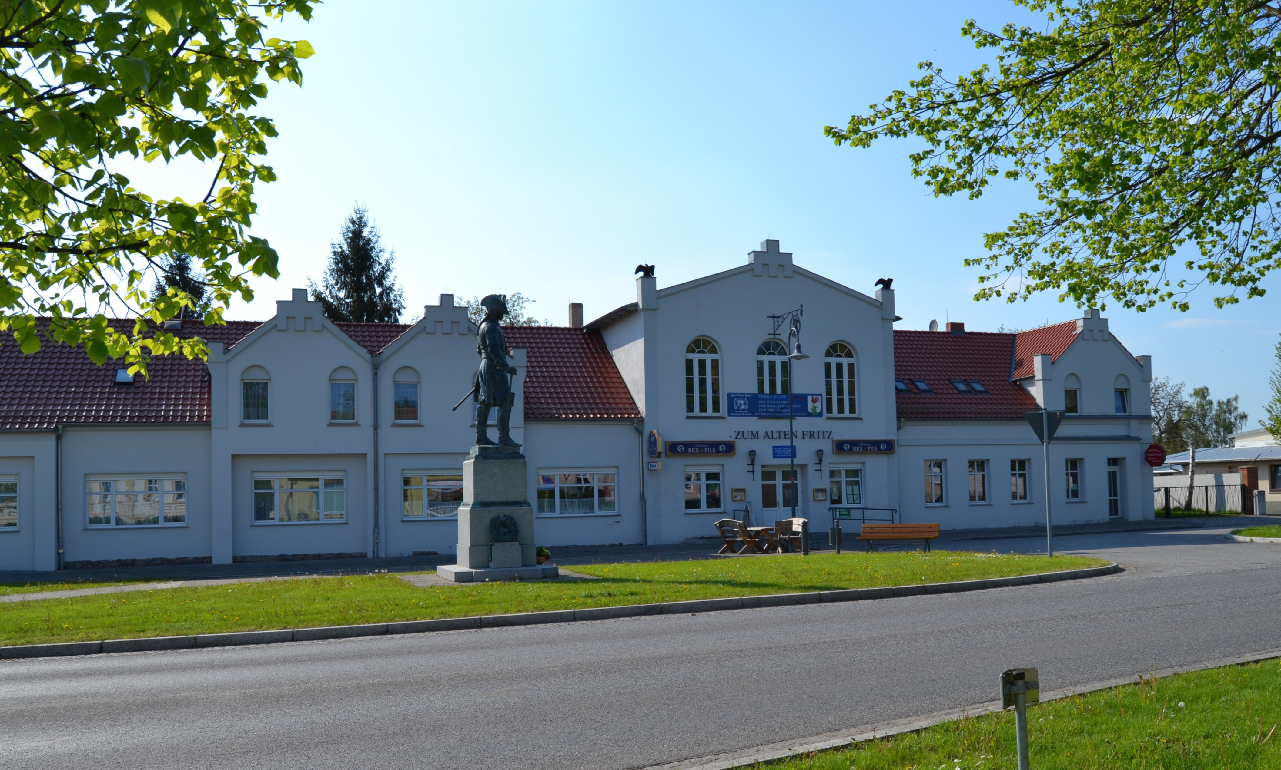 Gasthaus "Zum alten Fritz" in Letschin.